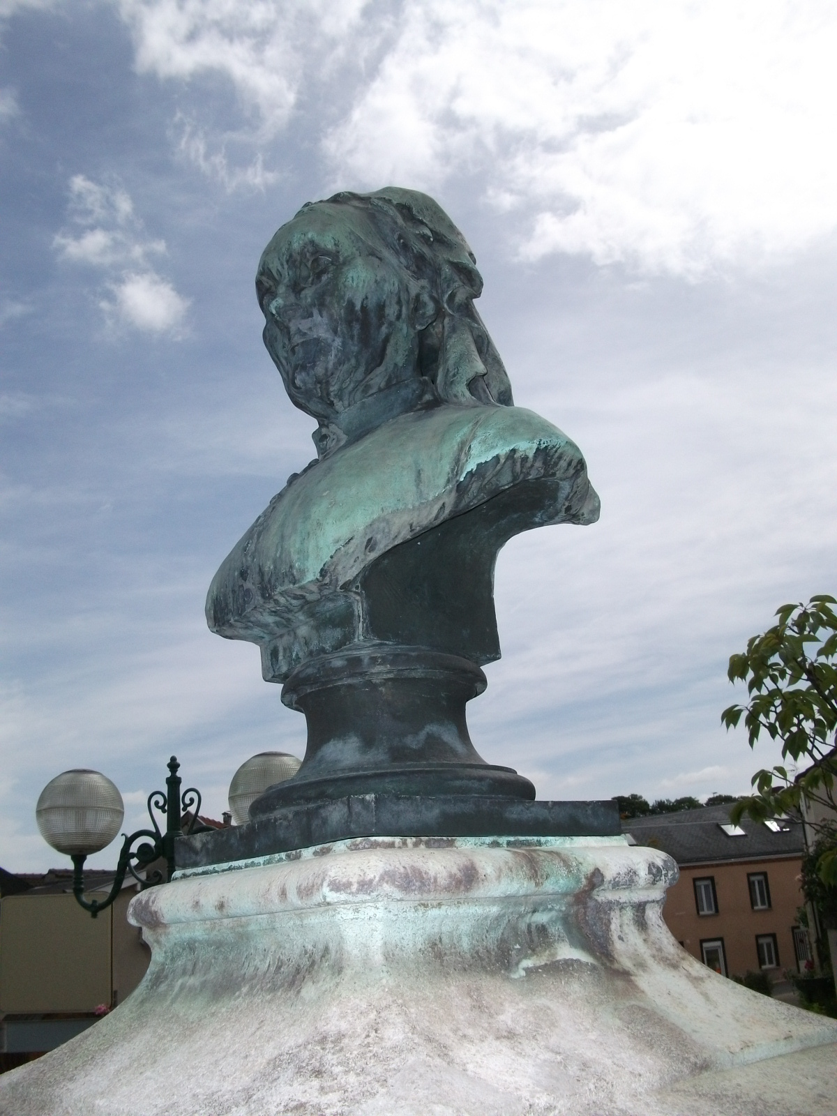 sur la place de Chigny-les-Roses, un buste de Jeanne Pommery surmontant la fontaine.